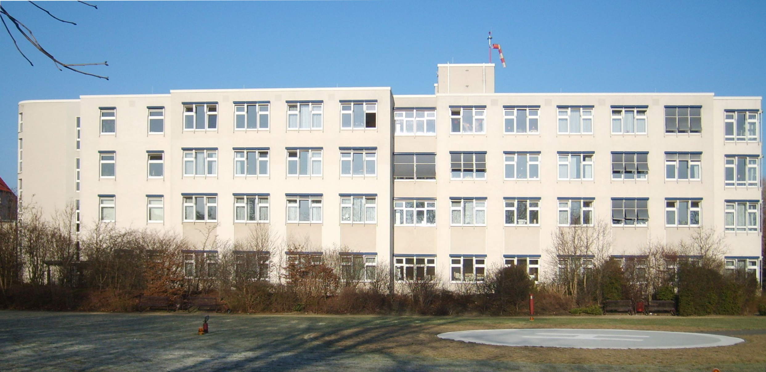 Der neue Elsterbrunnen in Elsterwerda